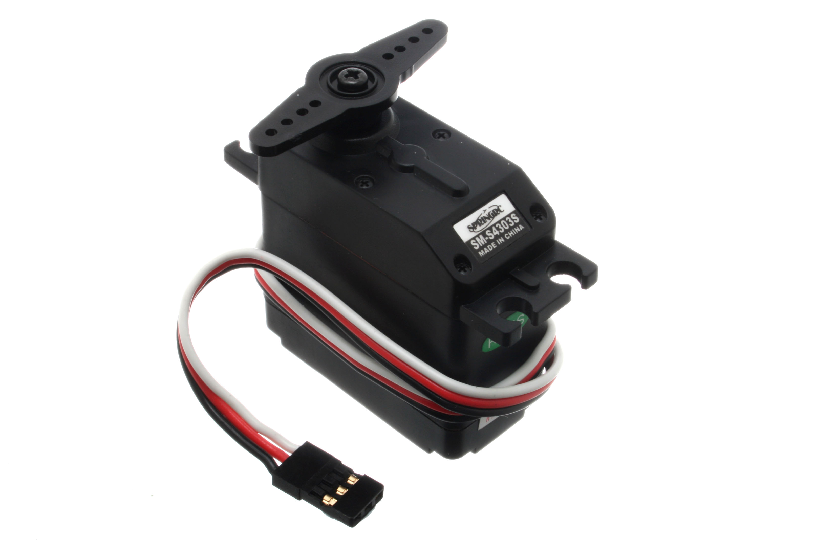 Standard Servo.